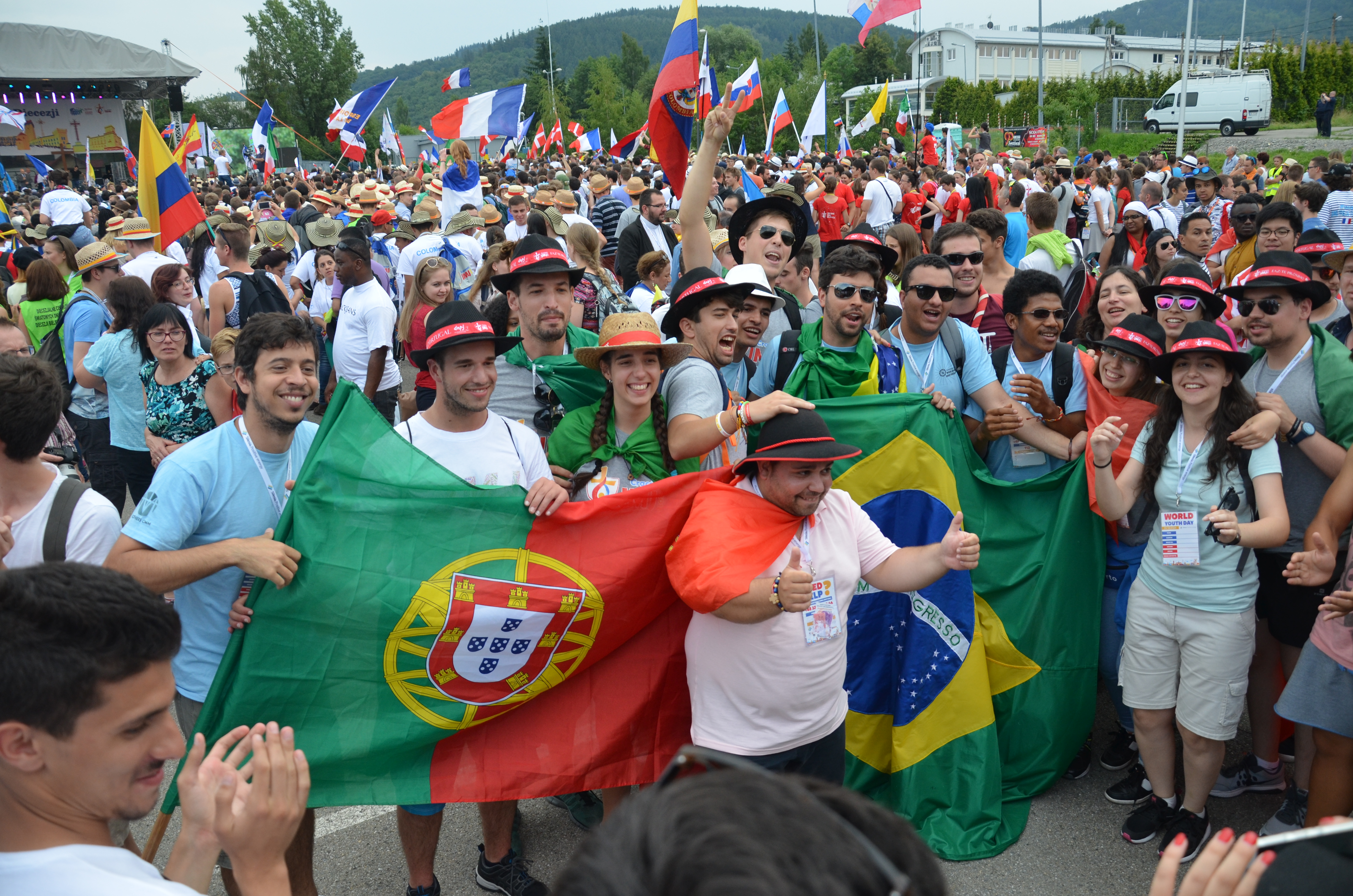 Weltjugendtag 2016 im Bistum Bielitz-Saybusch